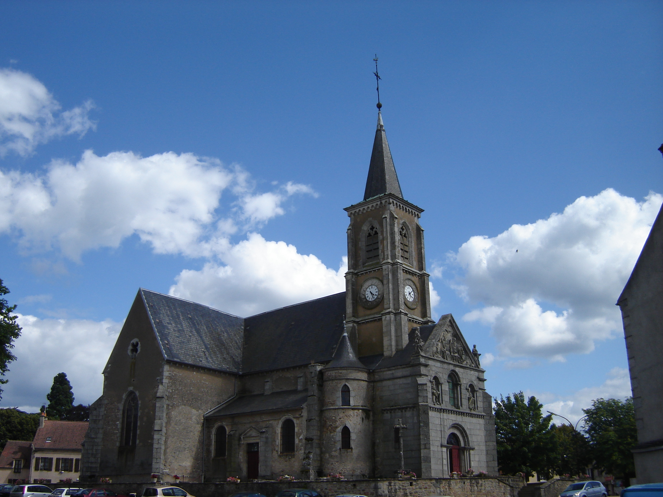 Photo de l'église de Quarré les tombes prise le 21 juillet 2008 du Nord Ouest .